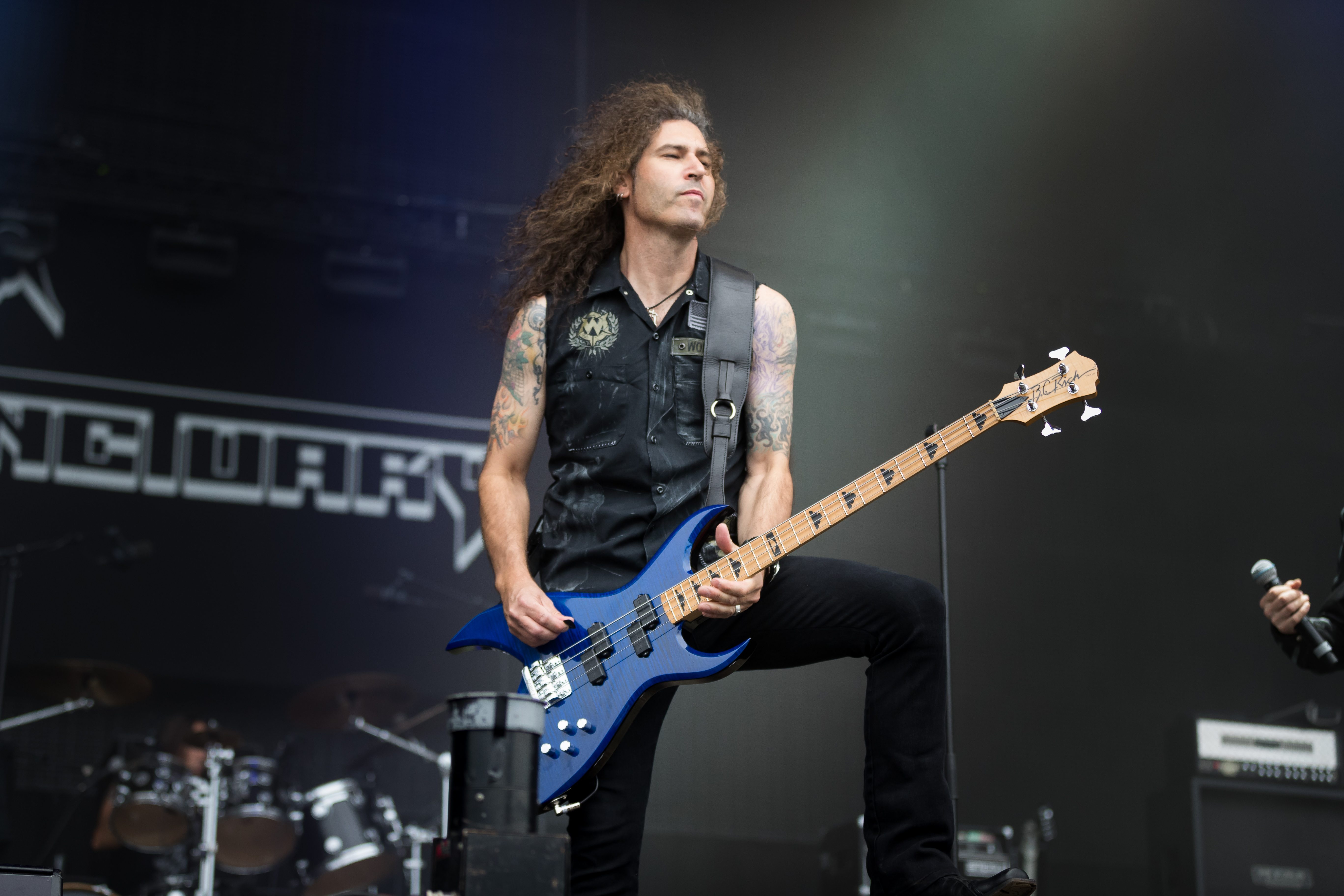 Sanctuary during Wacken Open Air at Schleswig-Holstein, Wacken, , Germany on 2017-08-04, Photo: Sven Mandel